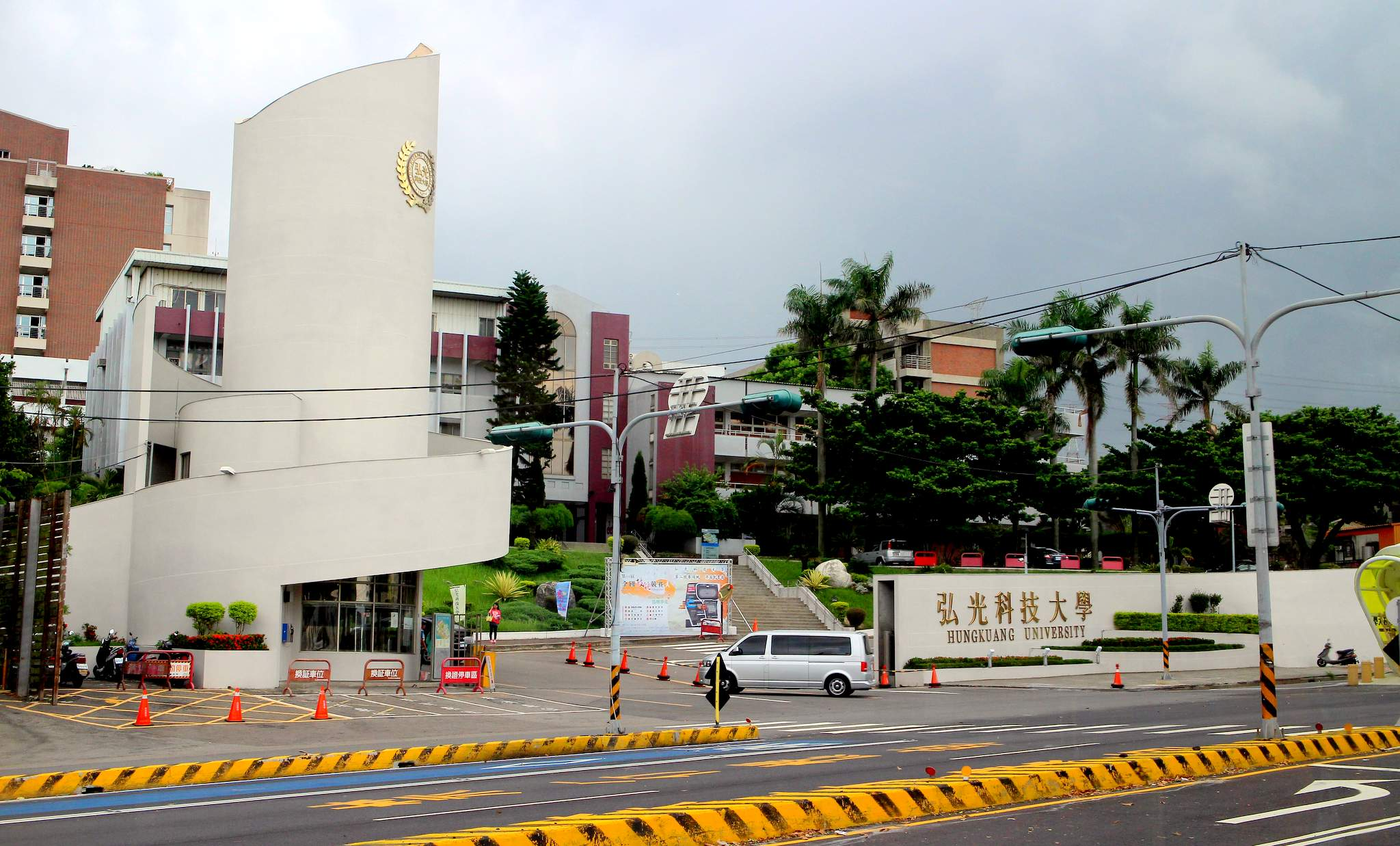 中文（台灣）: 弘光科技大學校門